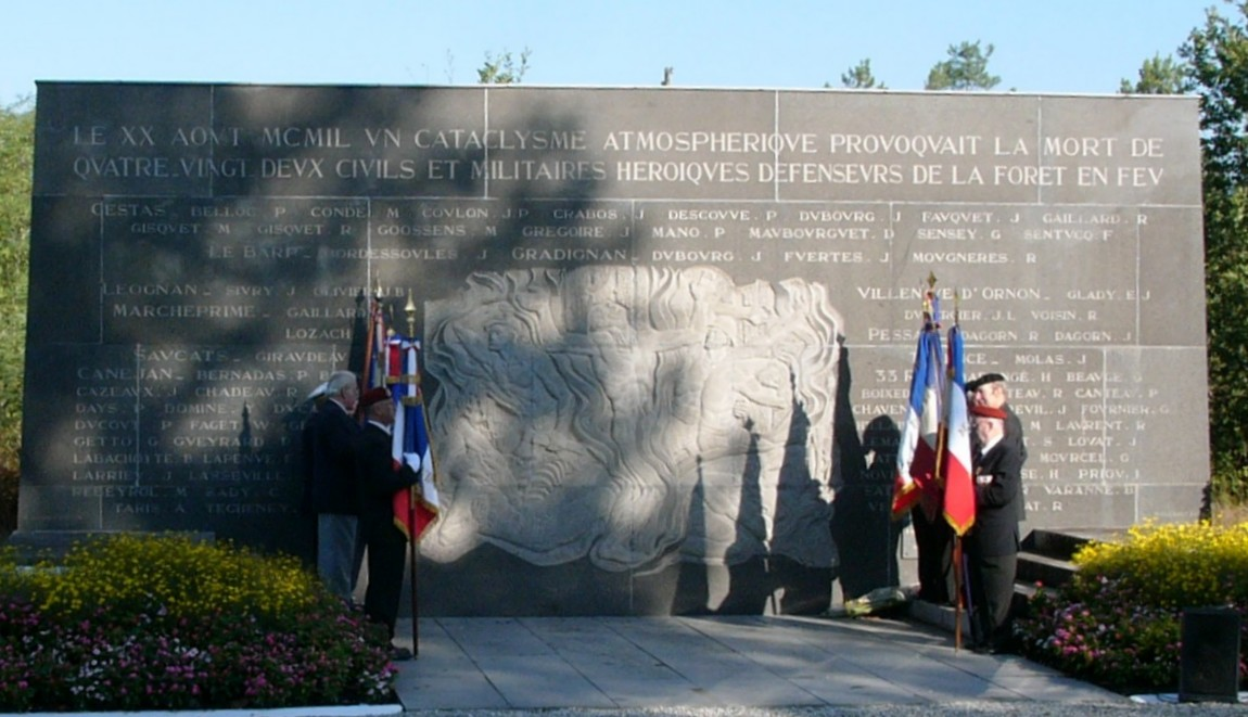 Monument aux morts des pompiers lors de la ceremonie à Cestas